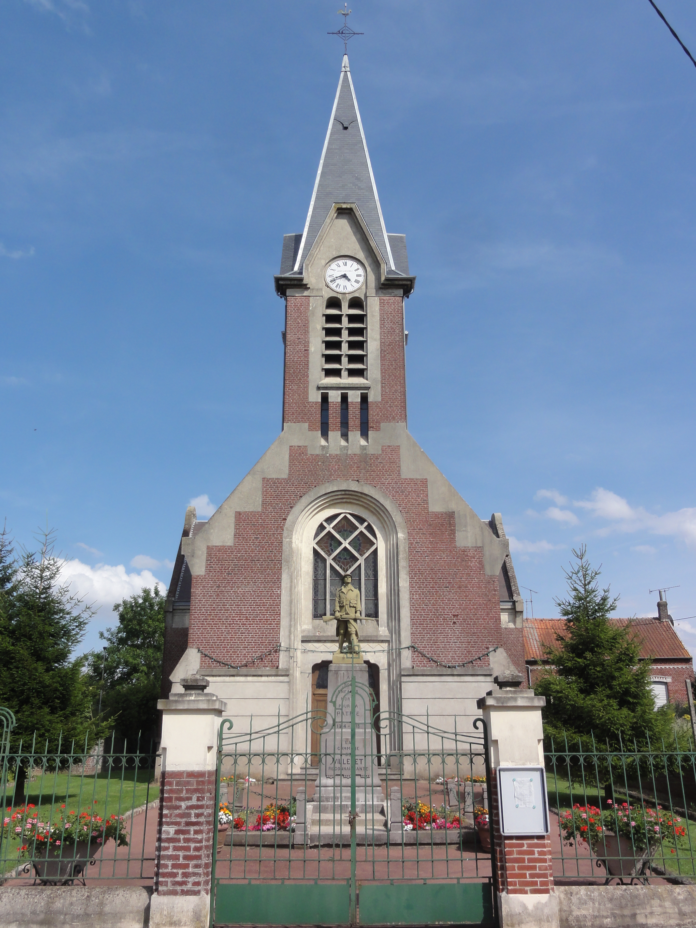 Villeret (Aisne) église